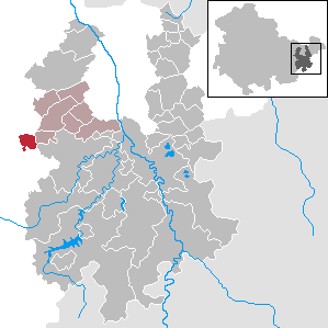 Schwarzbach in Thuringia - District Greiz